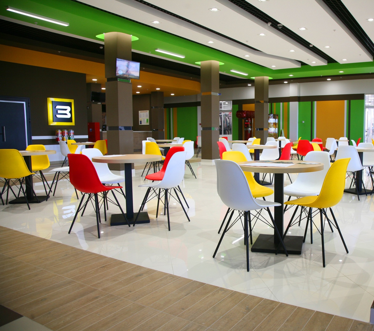 3 этаж